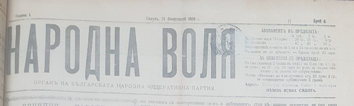 Главата на вестник Народна воля.